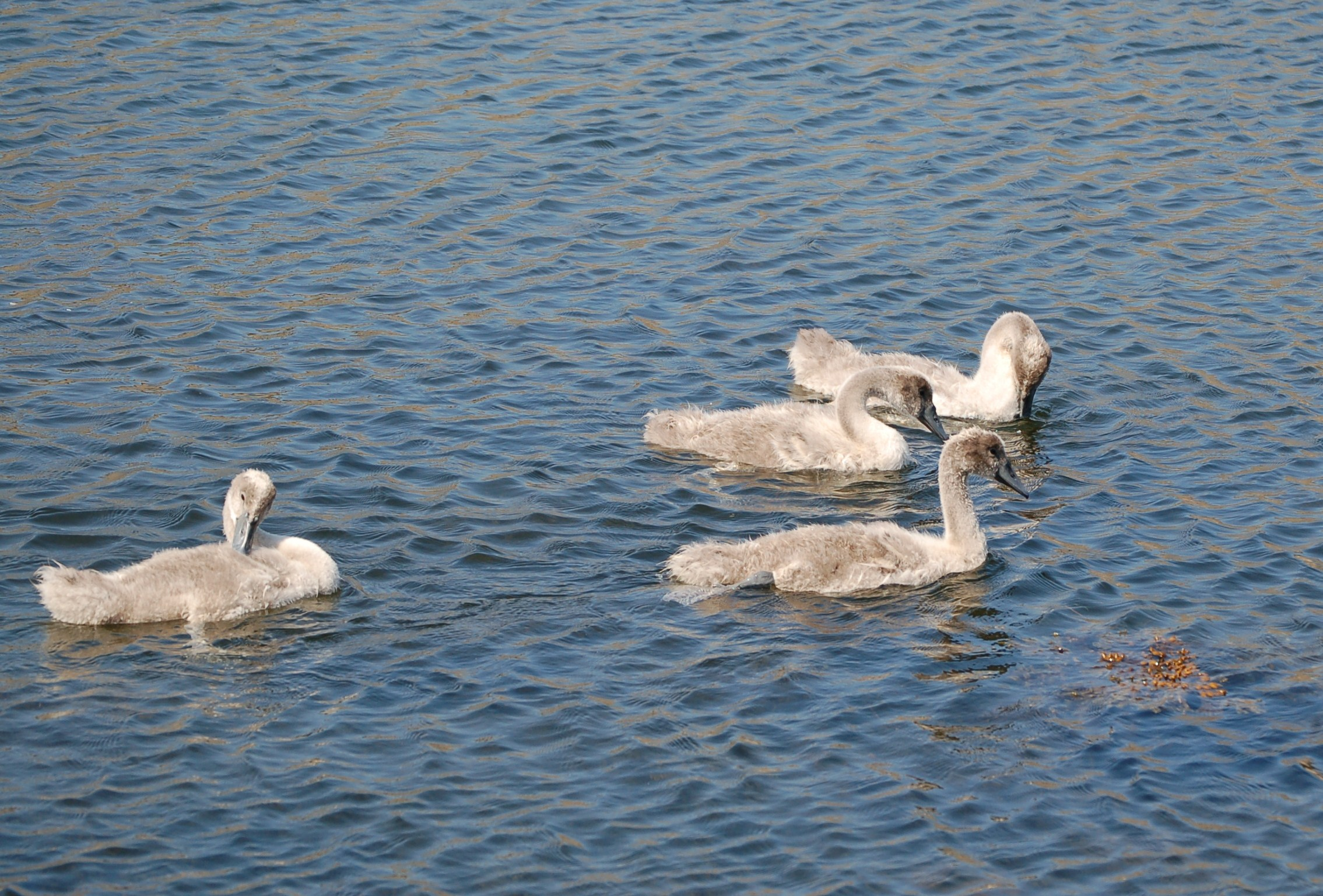 Unge knoppsvaner ved Stavernsøya